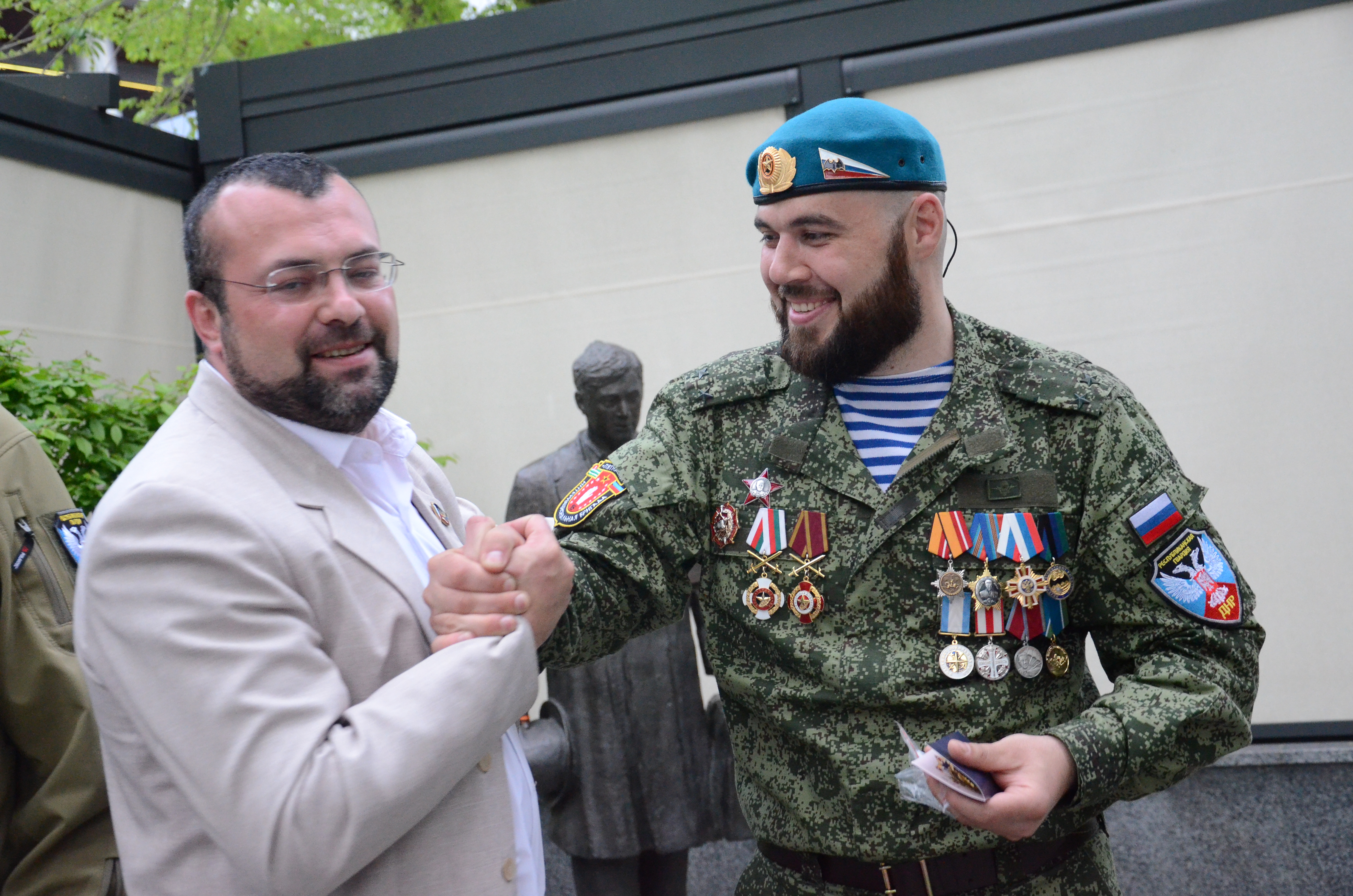 День Победы в Донецке